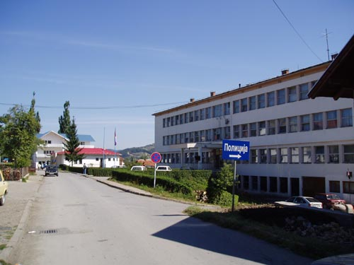 Зграда општине Петрово